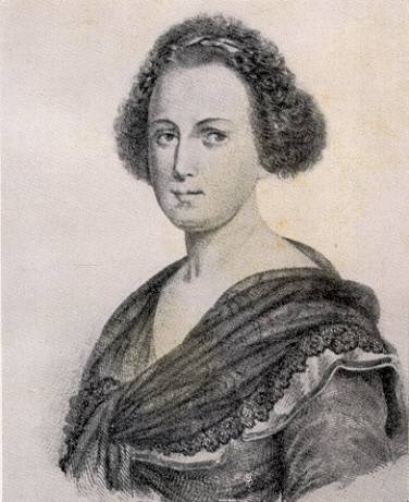 La patriota e scrittrice giacobina napoletana Eleonora Pimentel de Fonseca.